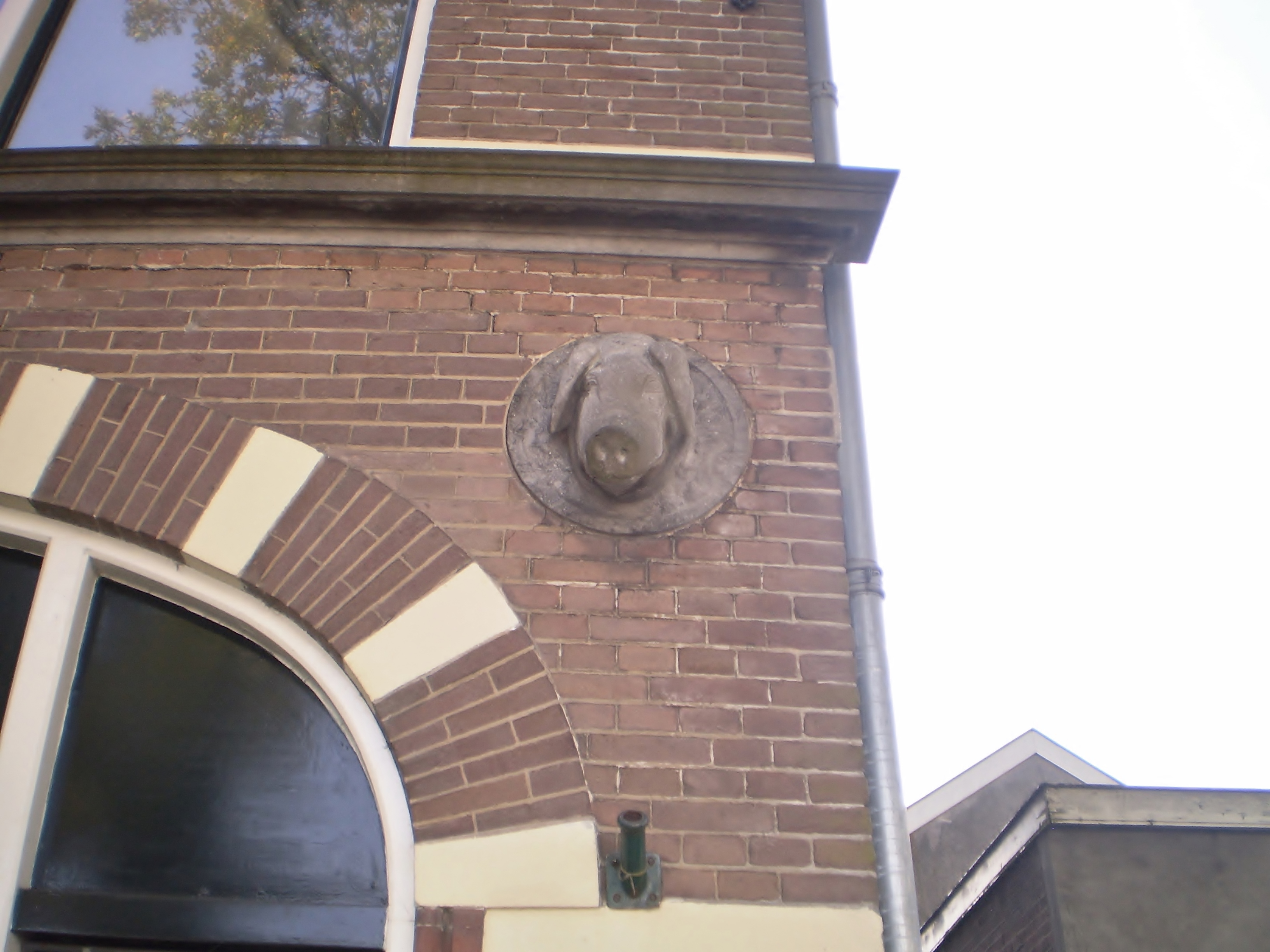 Kerkstraat 6